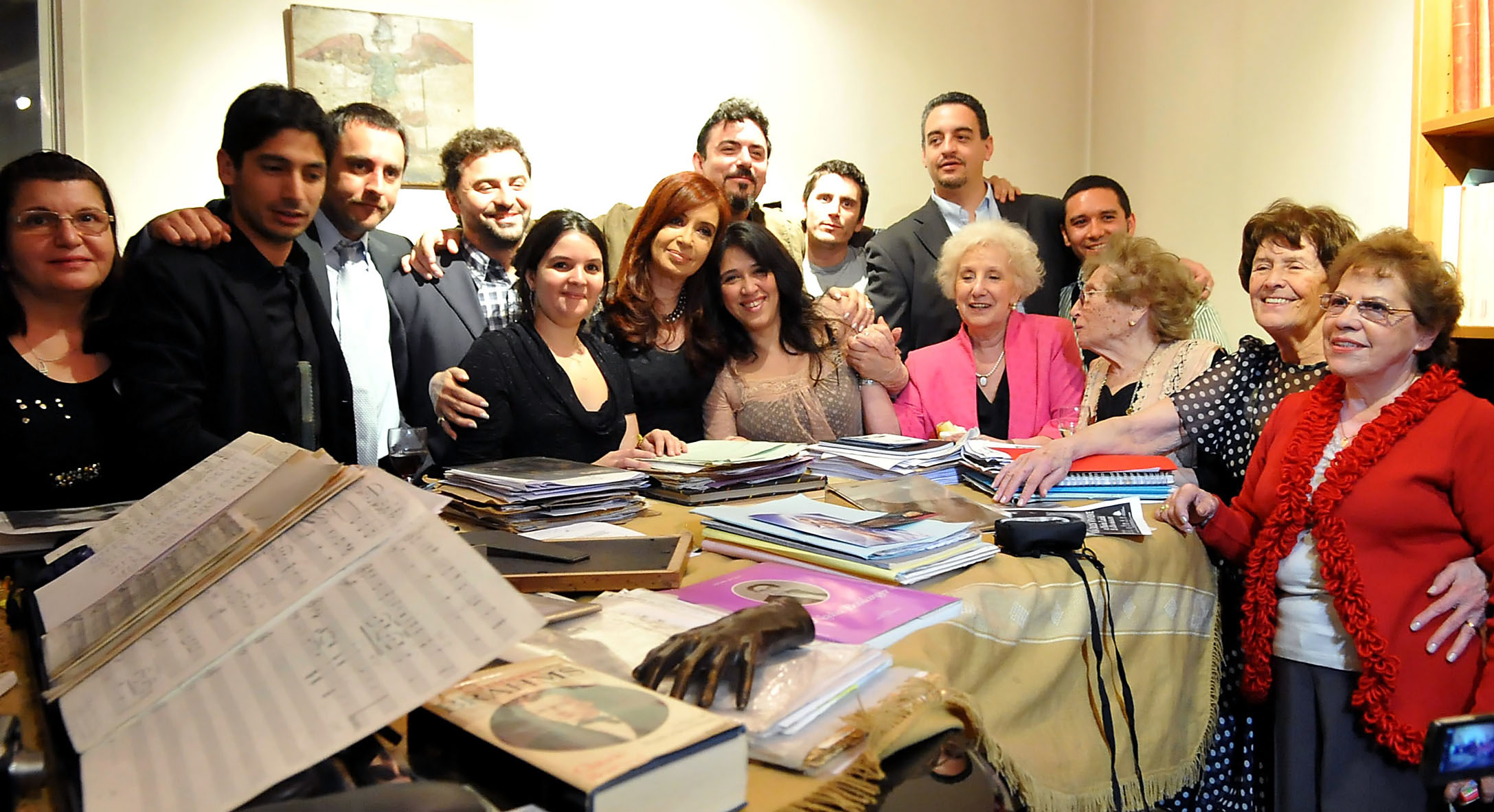 La presidenta Cristina Fernández se reunió con Abuelas de Plaza de Mayo, encabezadas por su titular, Estela de Carlotto, y nietos recuperados, en la residencia del embajador argentino ante la Unesco, Miguel Angel Estrella, en Paris, Francia.